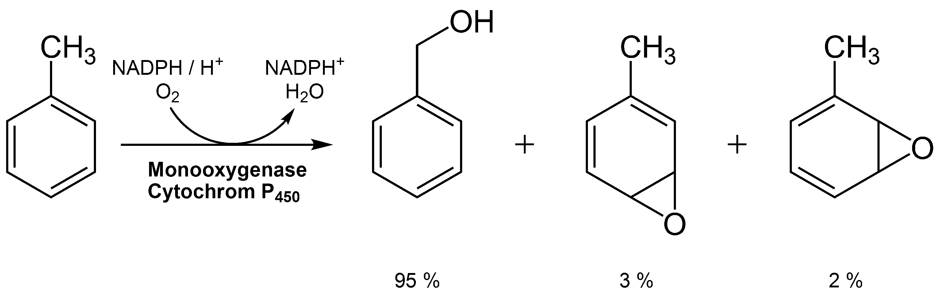 Toluolmetabolismus mittels einer Monooxygenase